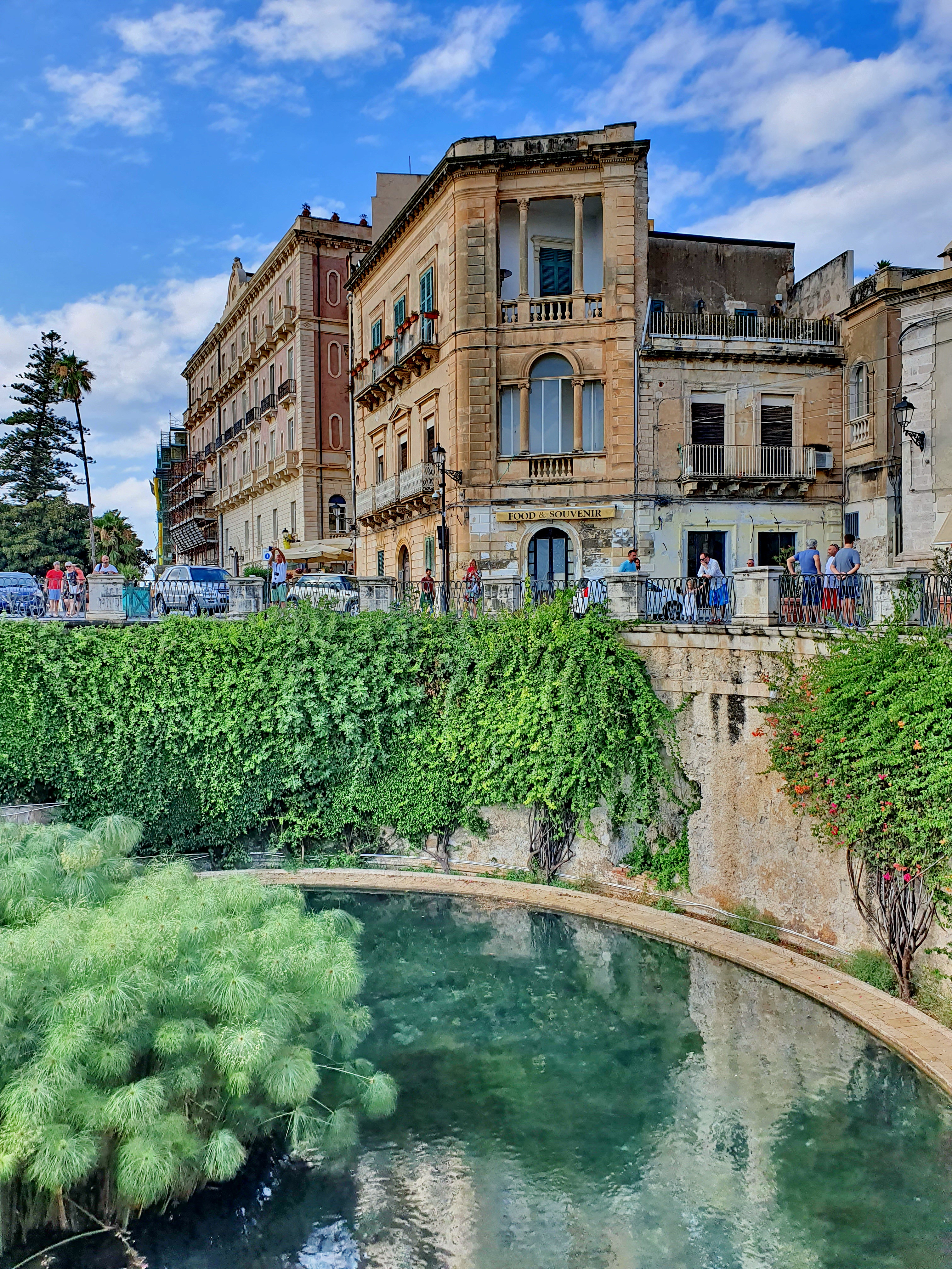 Sicile Juillet 2019 - Syracuse, Ortigia, Fonte Aretusa (I)